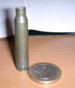 Cartouche provenant d'un tir de FAMAS